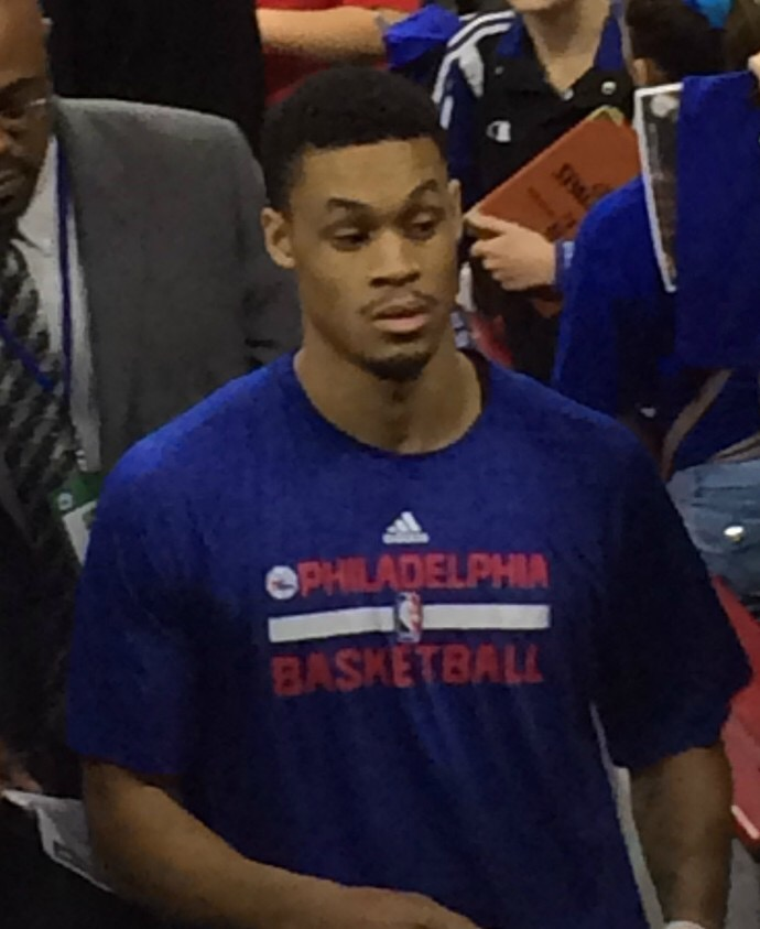 KJ McDaniels